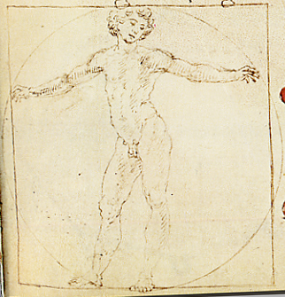 dessin de Francesco di Giorgio Martini (homme de Vitruve)